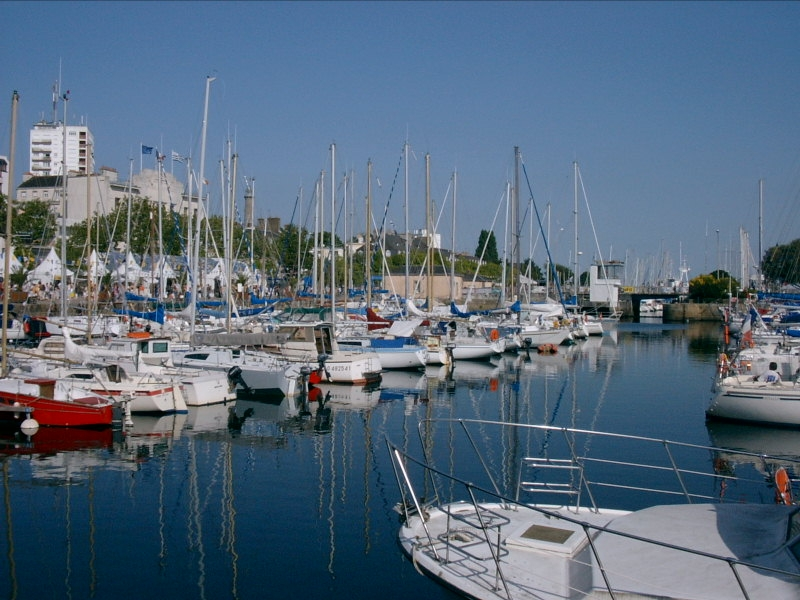 Lorient (France), yachting harbour.